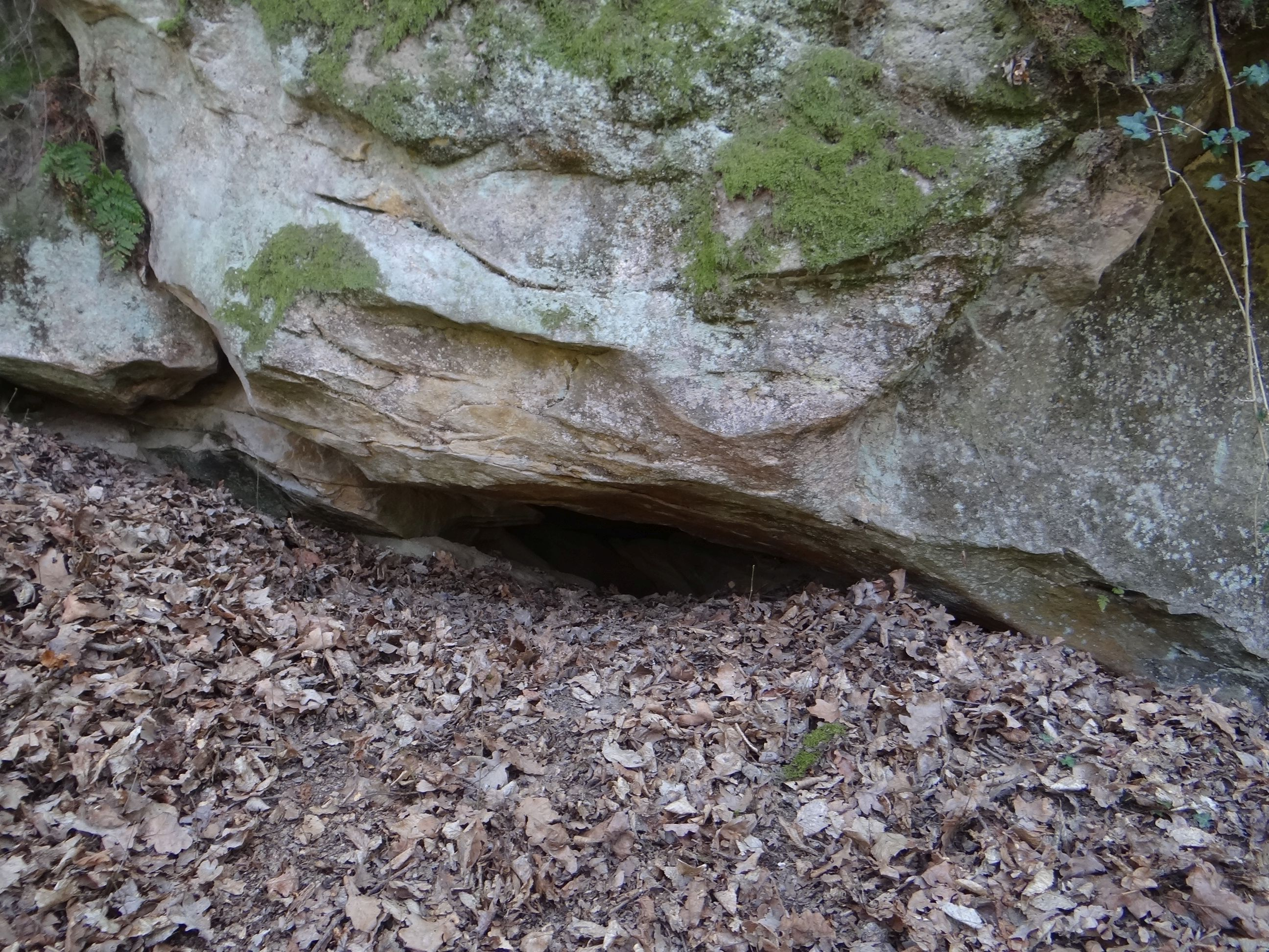 Jaskinia w Ciężkowicach II